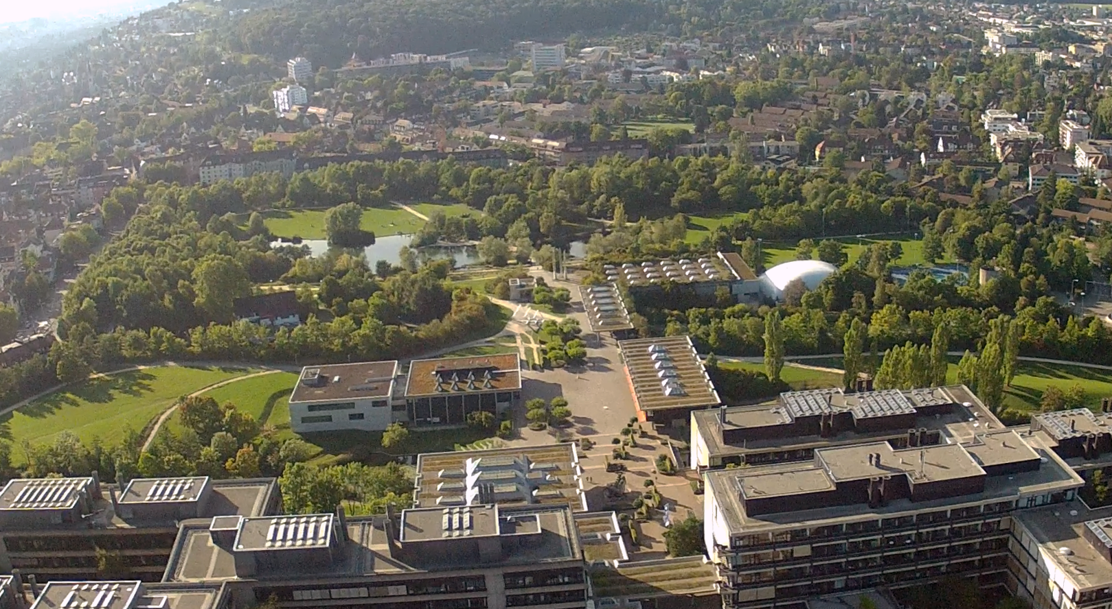 Ein Luftbild des Irchelparks in Zürich